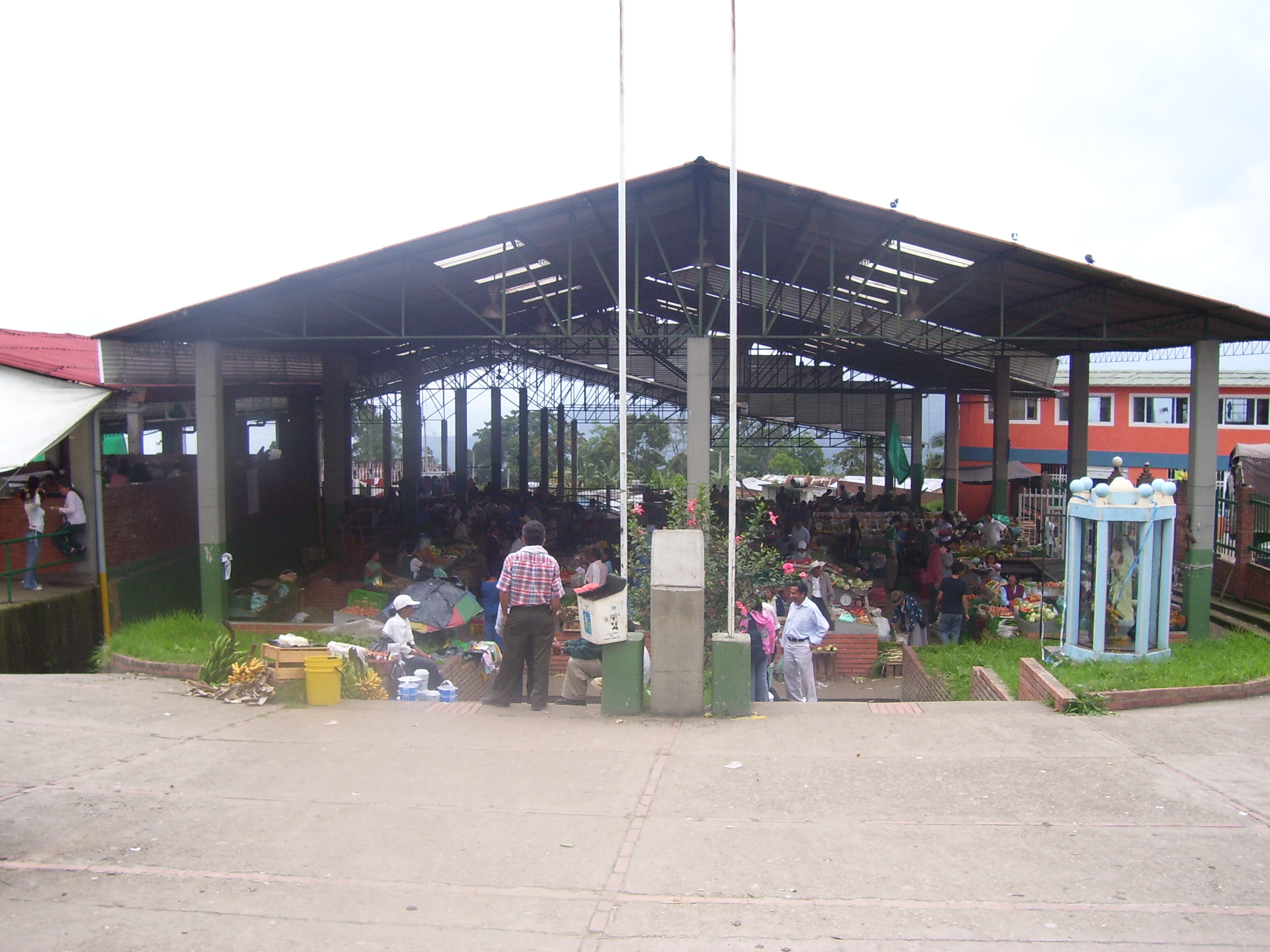 Plaza de mercado de Cachipay Cundinamarca